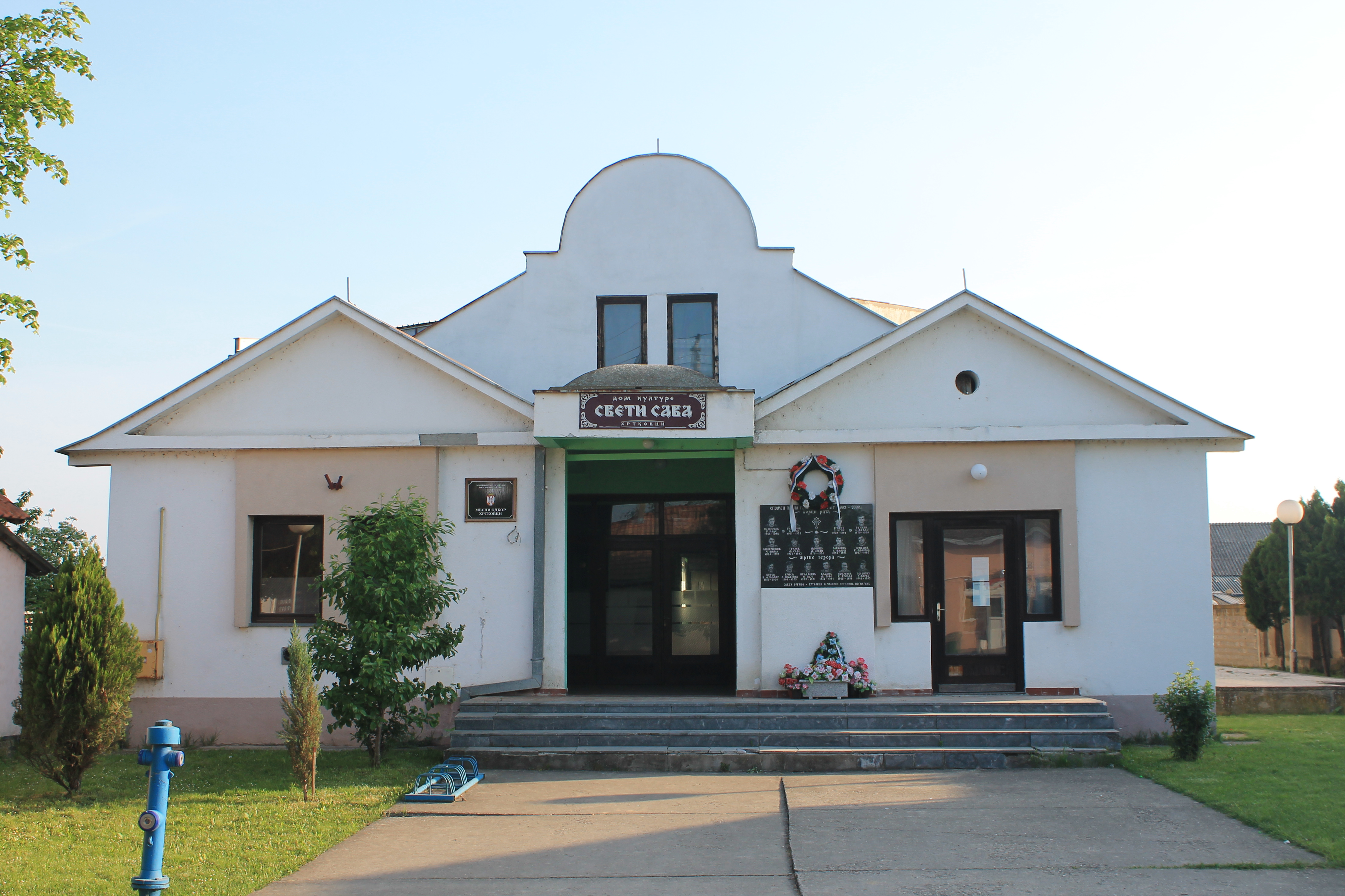 Hrtkovci